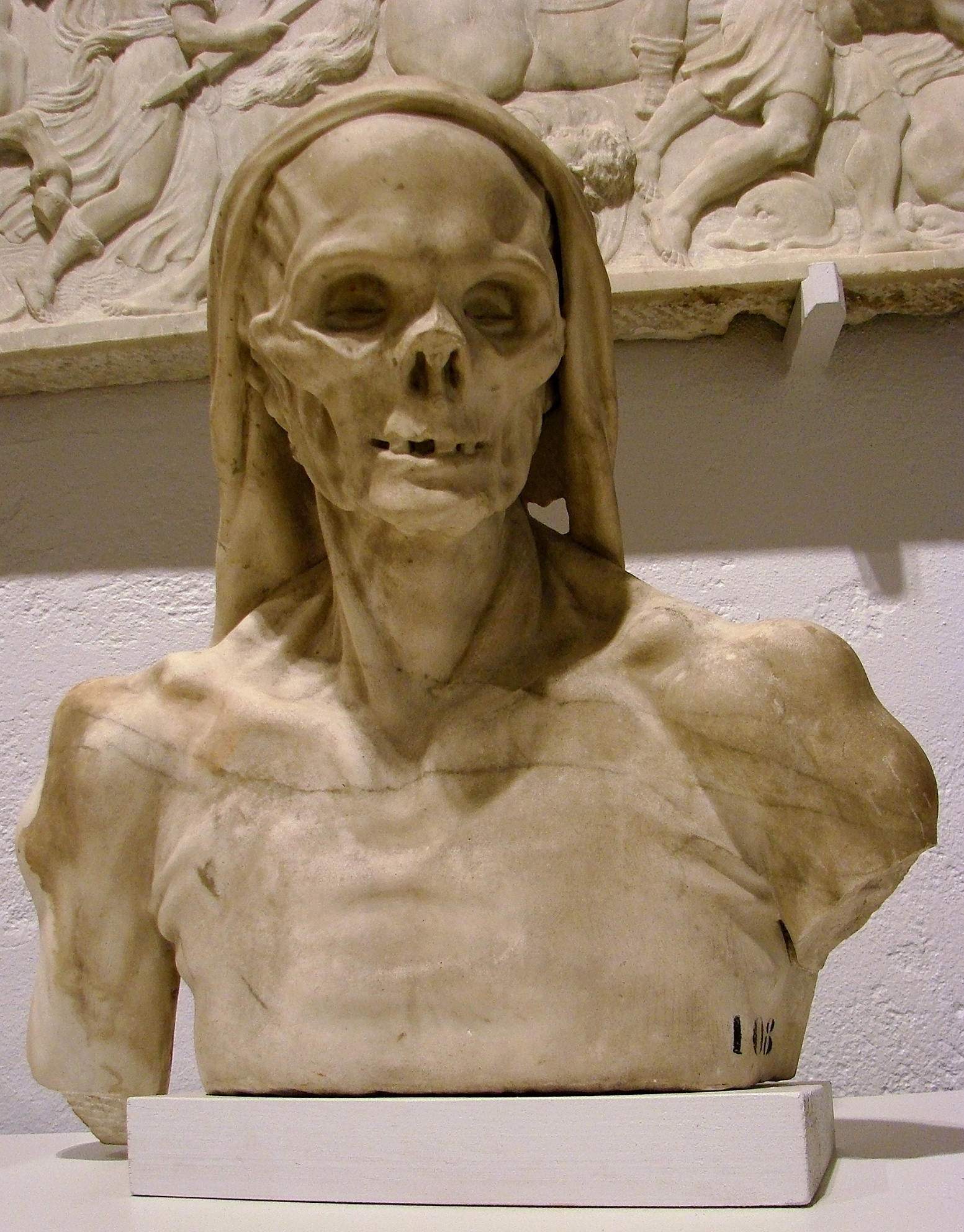 Un des deux bustes squelettiques provenant du tombeau du duc et de la duchesse de Vitry, situé à l'origine dans la chapelle Saint-Berchaire de Châteauvillain et démantelé à la Révolution. Par Gérard Van Opstal et Pierre Cardon, vers 1645, marbre blanc. Musée de Chaumont.